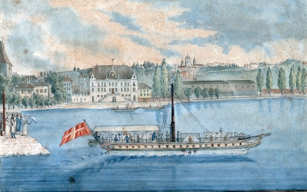 « Le port d'Ouchy, côté est ». Dessin, aquarelle, crayon, plume et encre. Auteur inconnu. Le « Guillaume Tell » sort du port d'Ouchy, vu depuis le lac. Un groupe assiste au départ du bateau depuis la jetée du port. Au deuxième plan : le village d'Ouchy (tour du château, quelques maisons, l'Hôtel de l'Ancre et son escalier monumental, les halles. La ville de Lausanne se trouve à l'arrière plan.